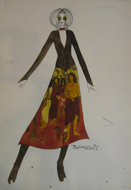 Σχέδιο του Γιάννη Τσεκλένη. Συλλογή "Ιμπρεσιονιστές". Αθήνα 1971-1972 2009.14.9 / Συλλογή Πελοποννησιακού Λαογραφικού Ιδρύματος